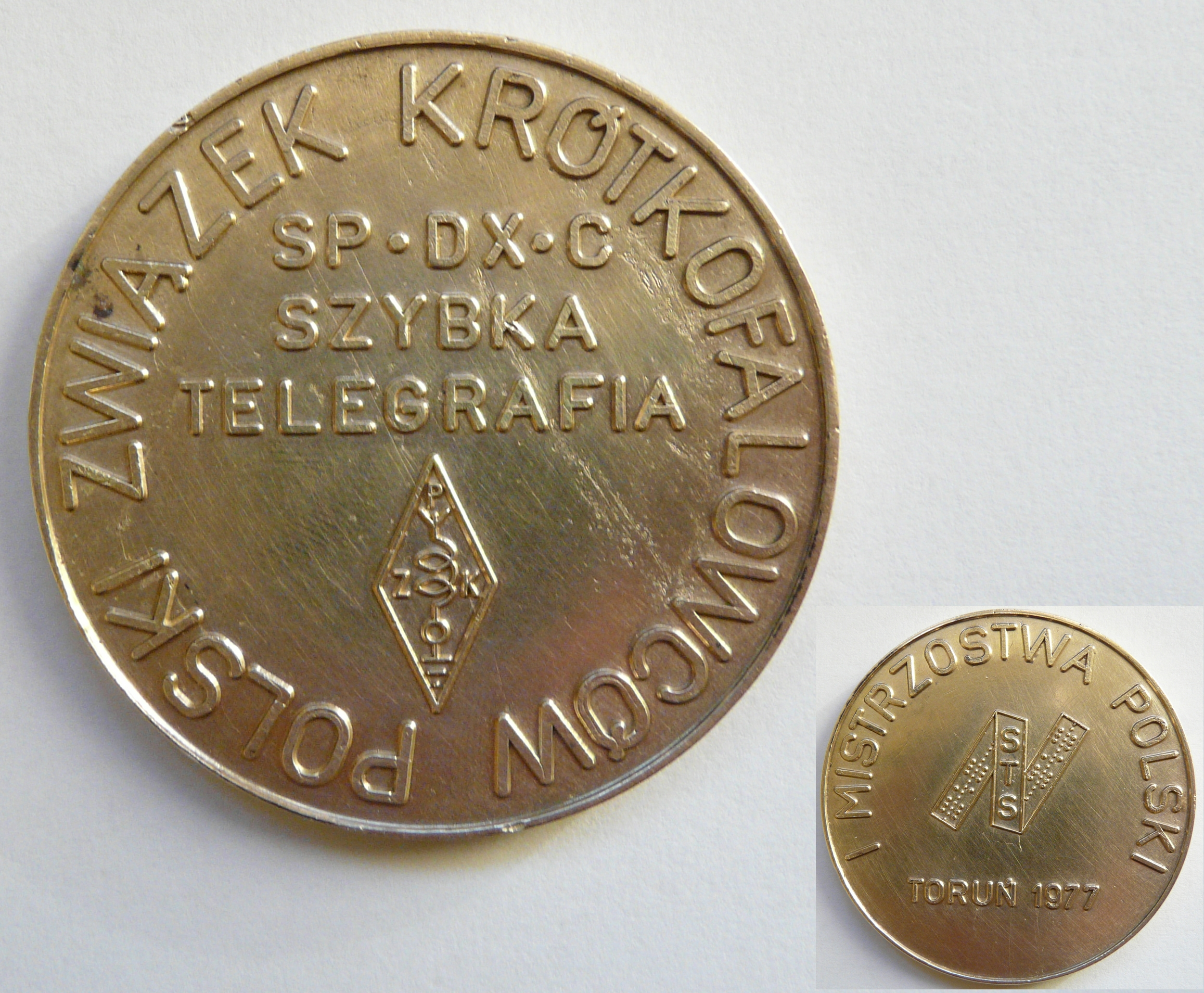 Medal, I Mistrzostwa Polski w Szybkiej Telegrafii Sportowej w Toruniu (1977r.), organizator Polski Związek Krótkofalowców